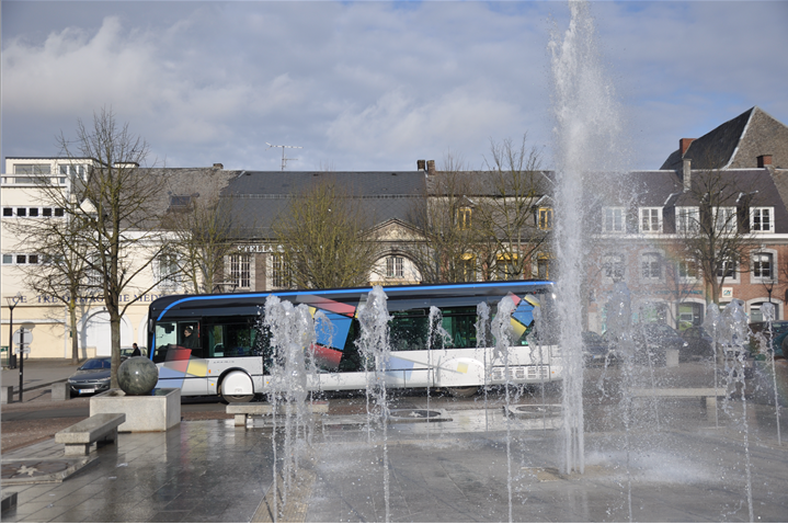 Un "busway" de Stibus.